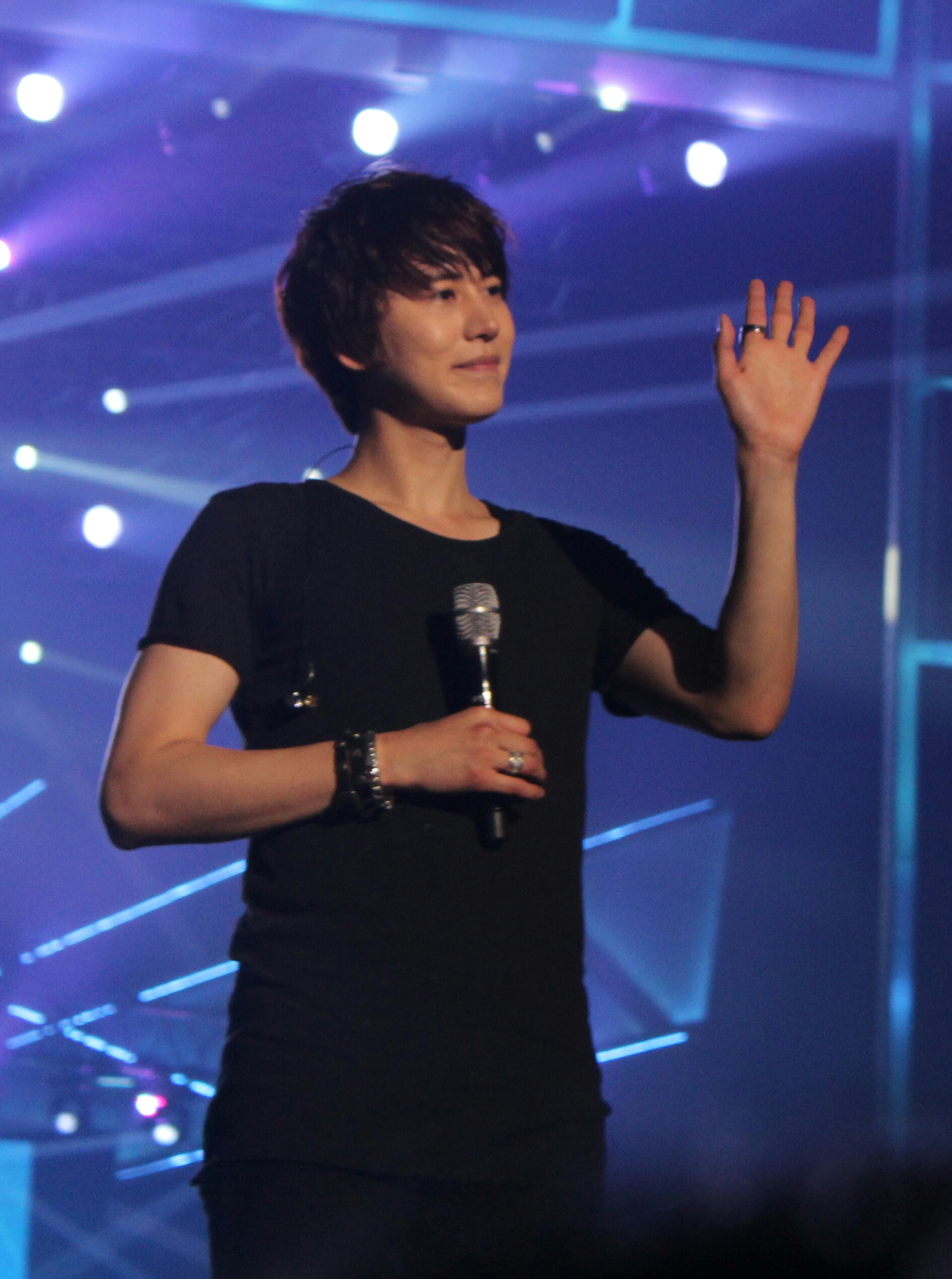 Kyuhyun during Super Show 5 in Manila